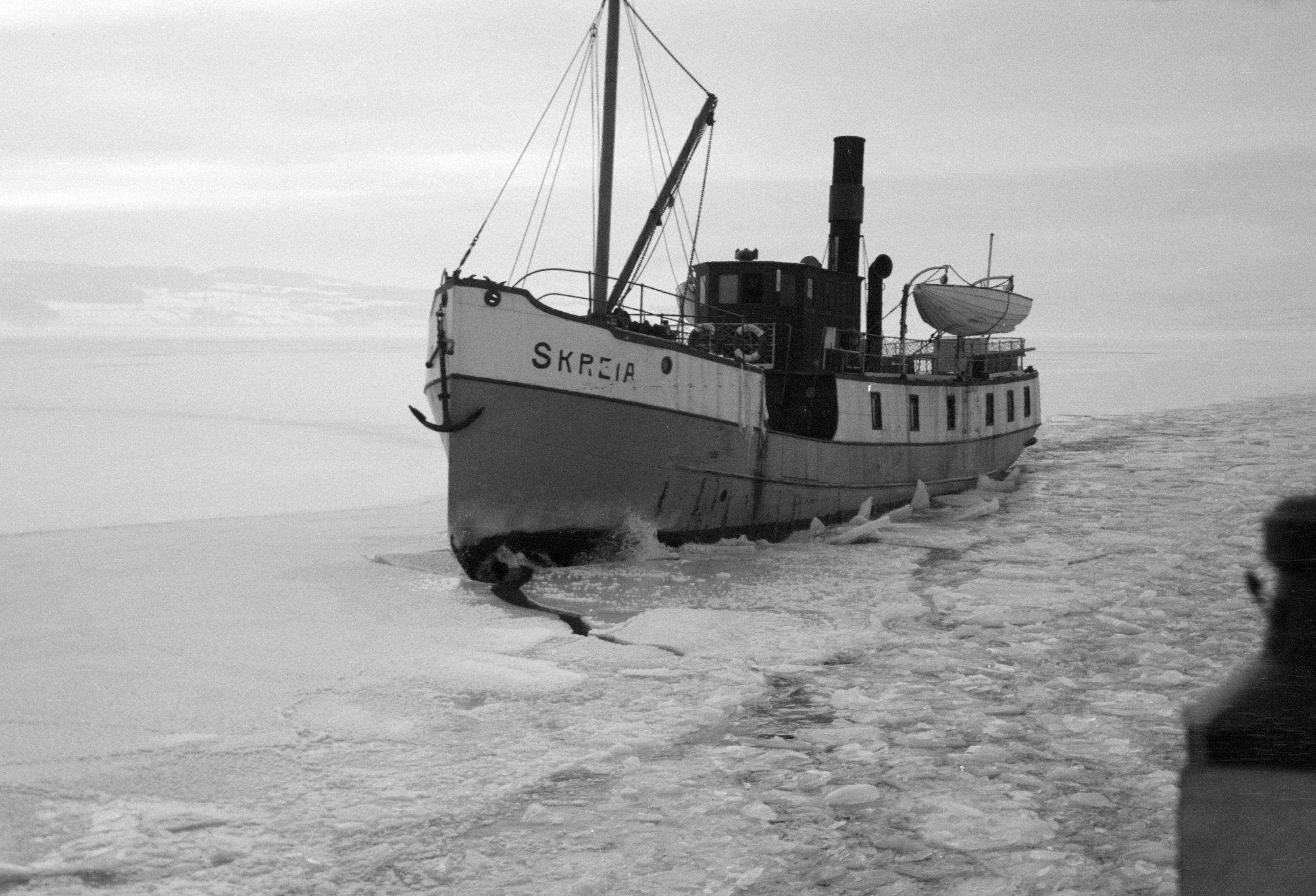 D/S Skreia bryter is på Mjøsa.